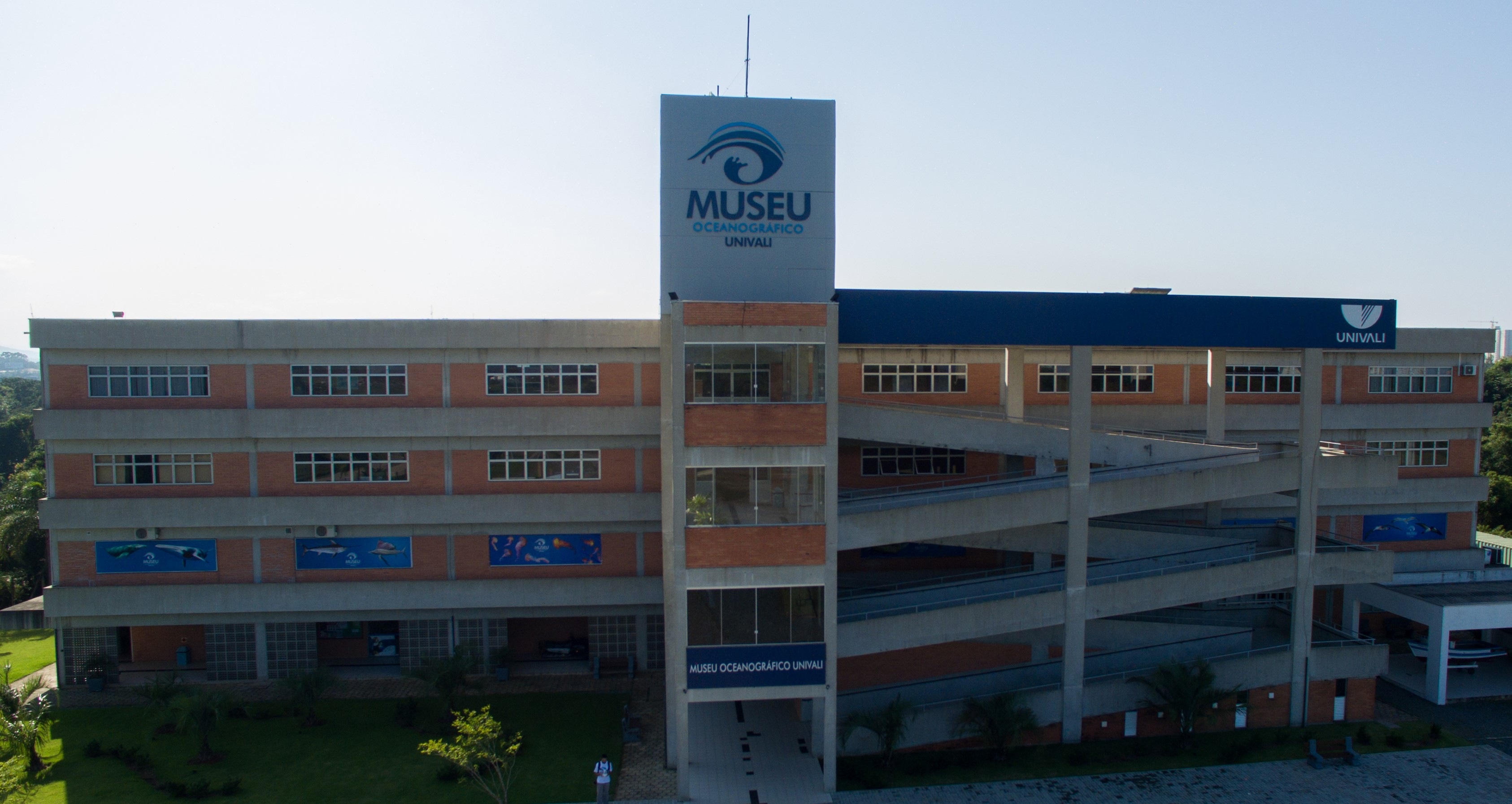 Fachada do museu localizado em Balneário Piçarras, no campus da Universidade do Vale do Itajaí.